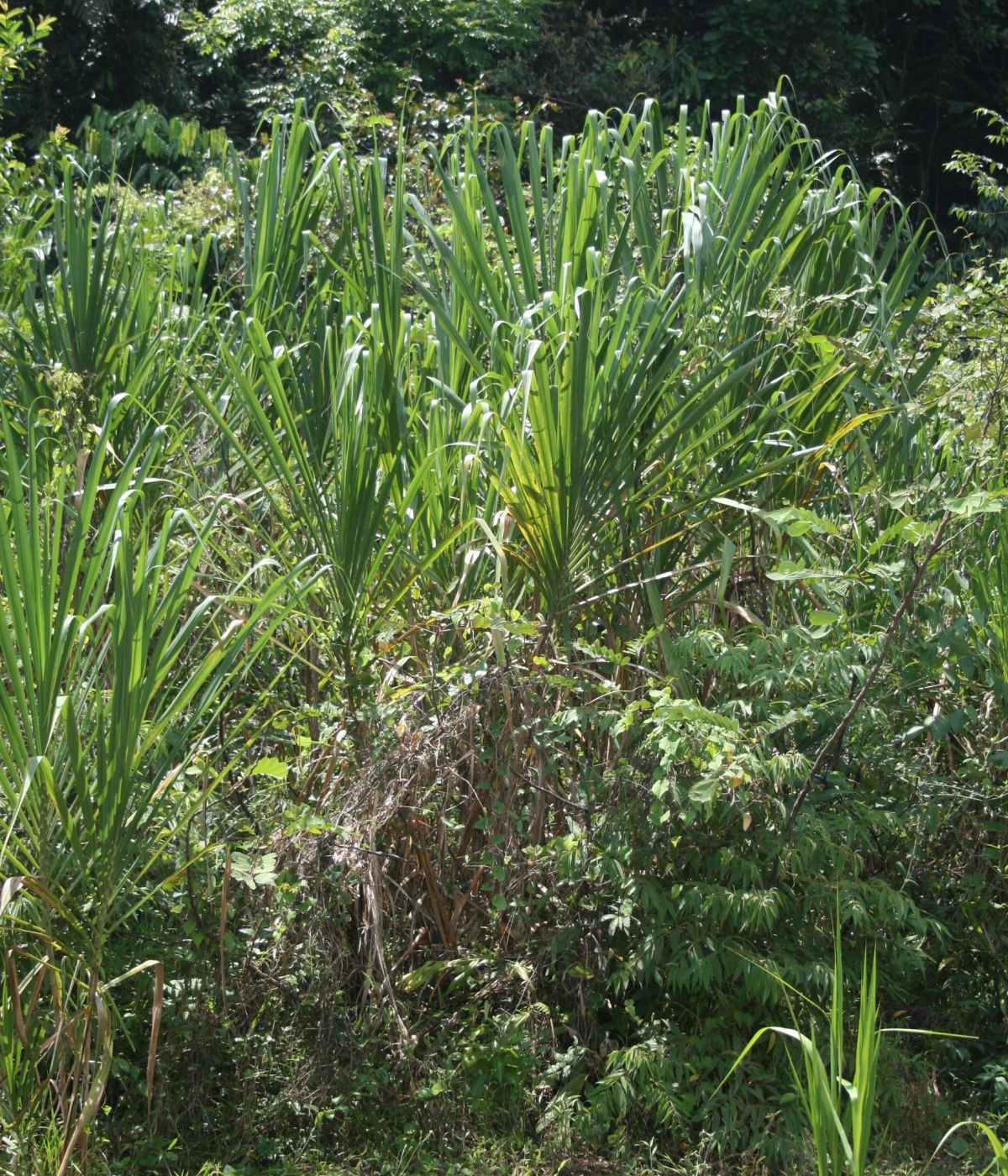 Gynerium sagittatum, Süßgräser (Poaceae) - Costa Rica: Prov. Puntarenas, La Gamba NW Golfito, Valle Bonito